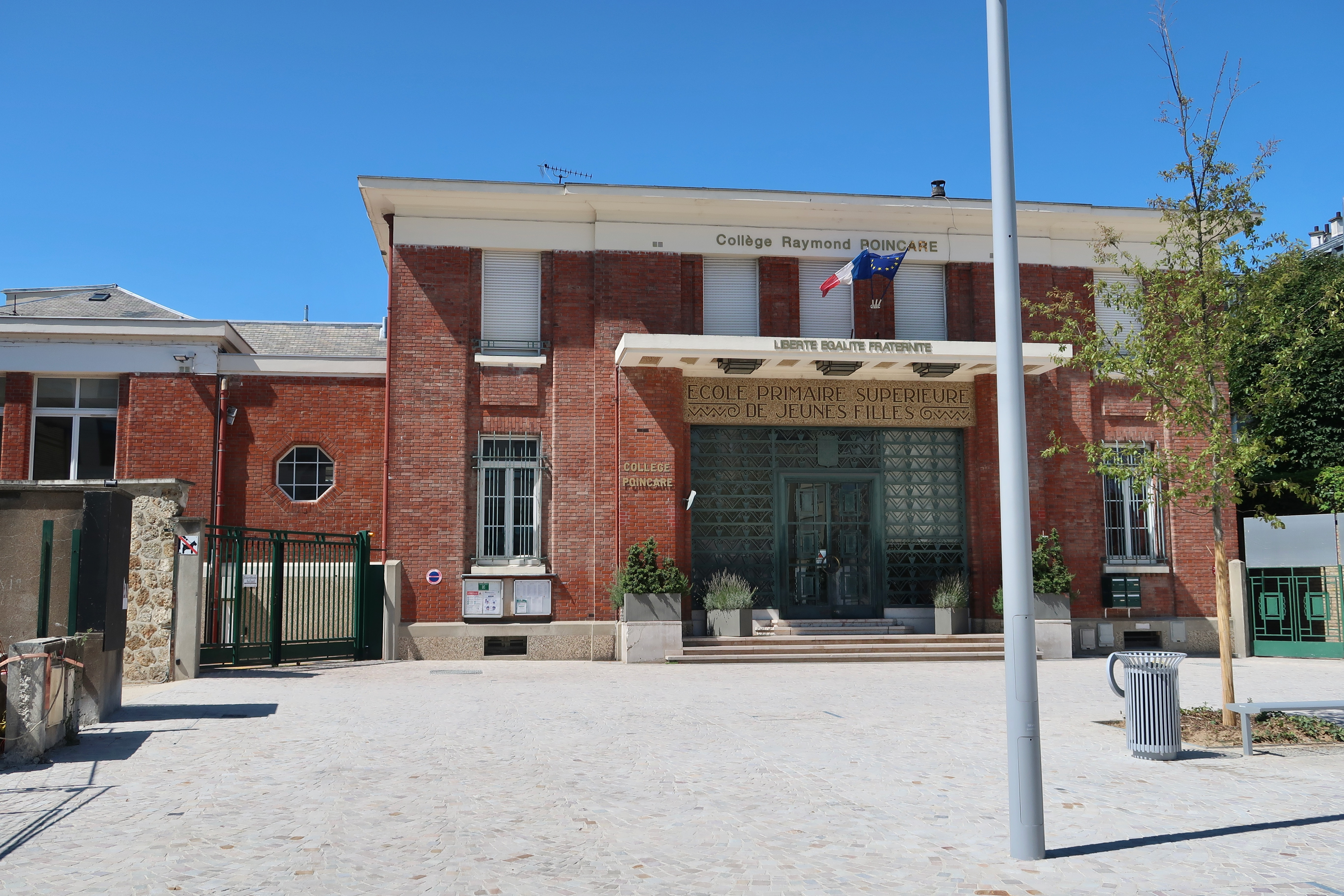 Collège Raymond-Poincaré (ancienne école primaire supérieure de jeunes filles), place Raymond-Poincaré, à Versailles (Yvelines).